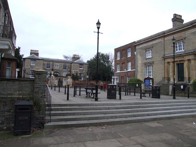 Museum Square.